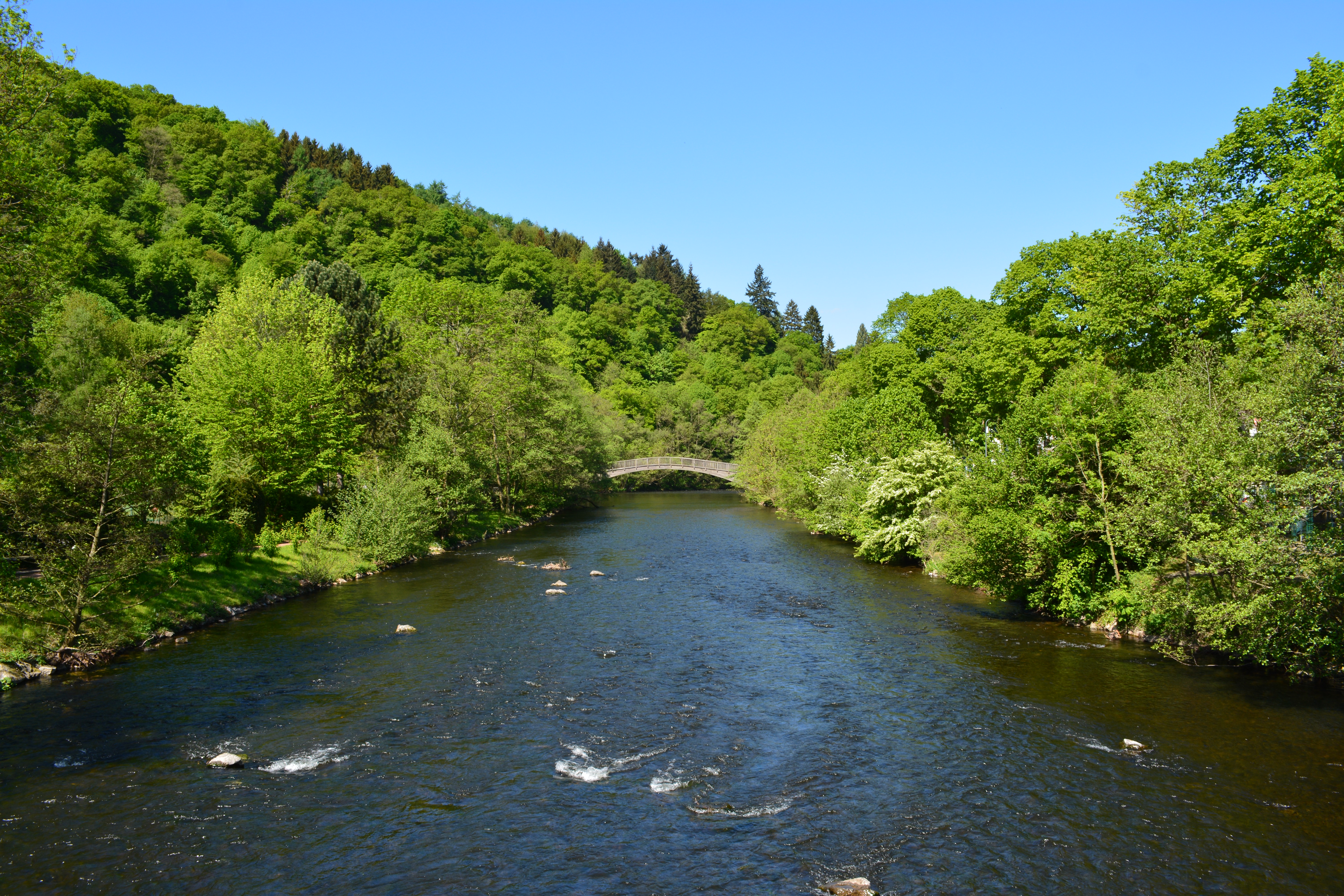 Rurtal bei Heimbach